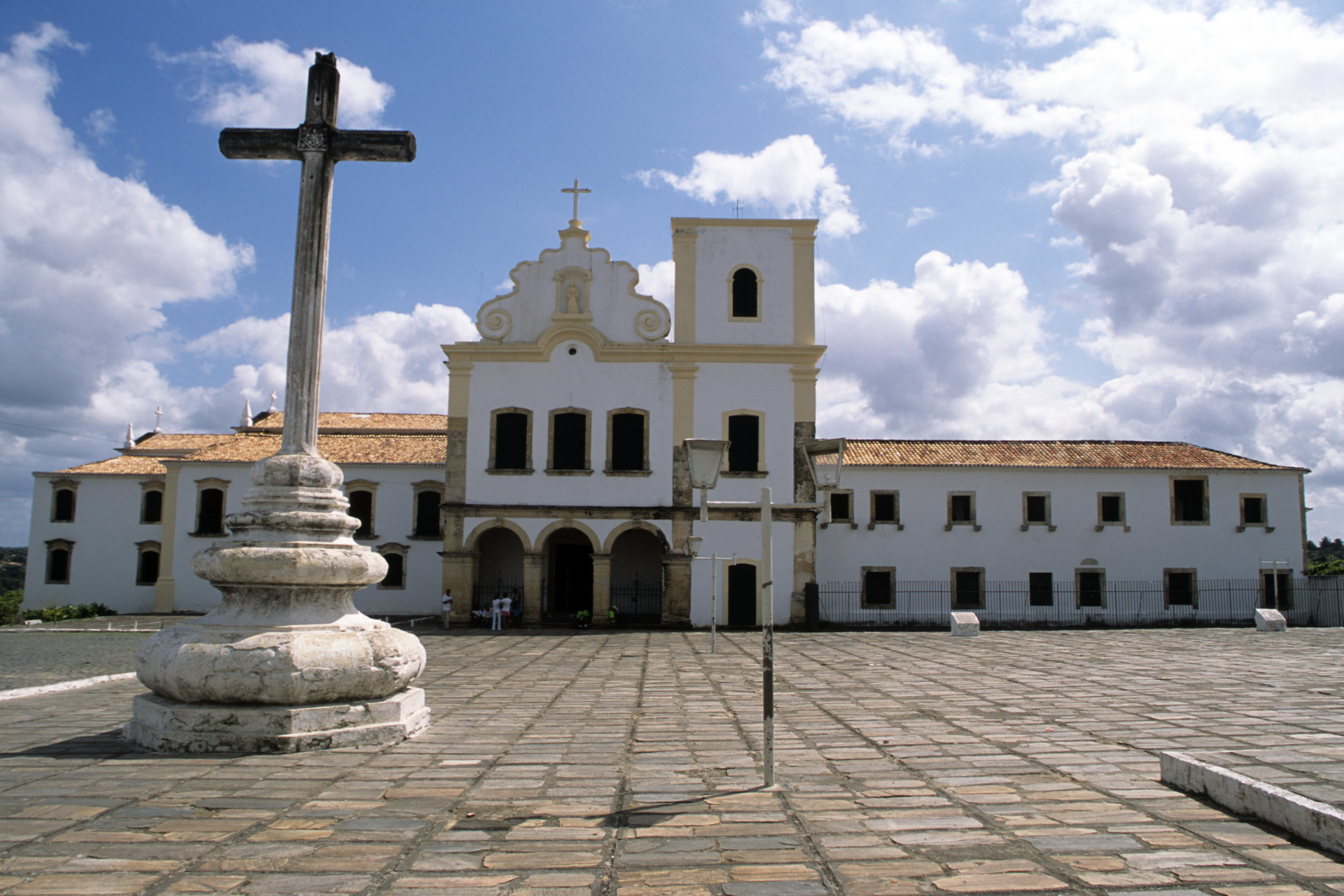 Crédito: Anderson Schneider/IPHAN